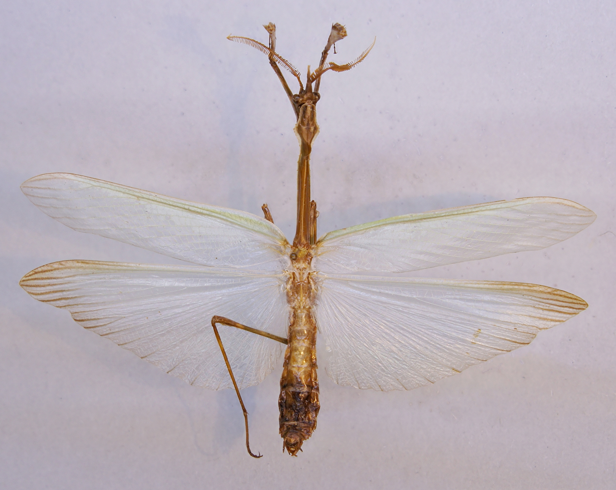 Empusa pennata (Thunberg, 1815)